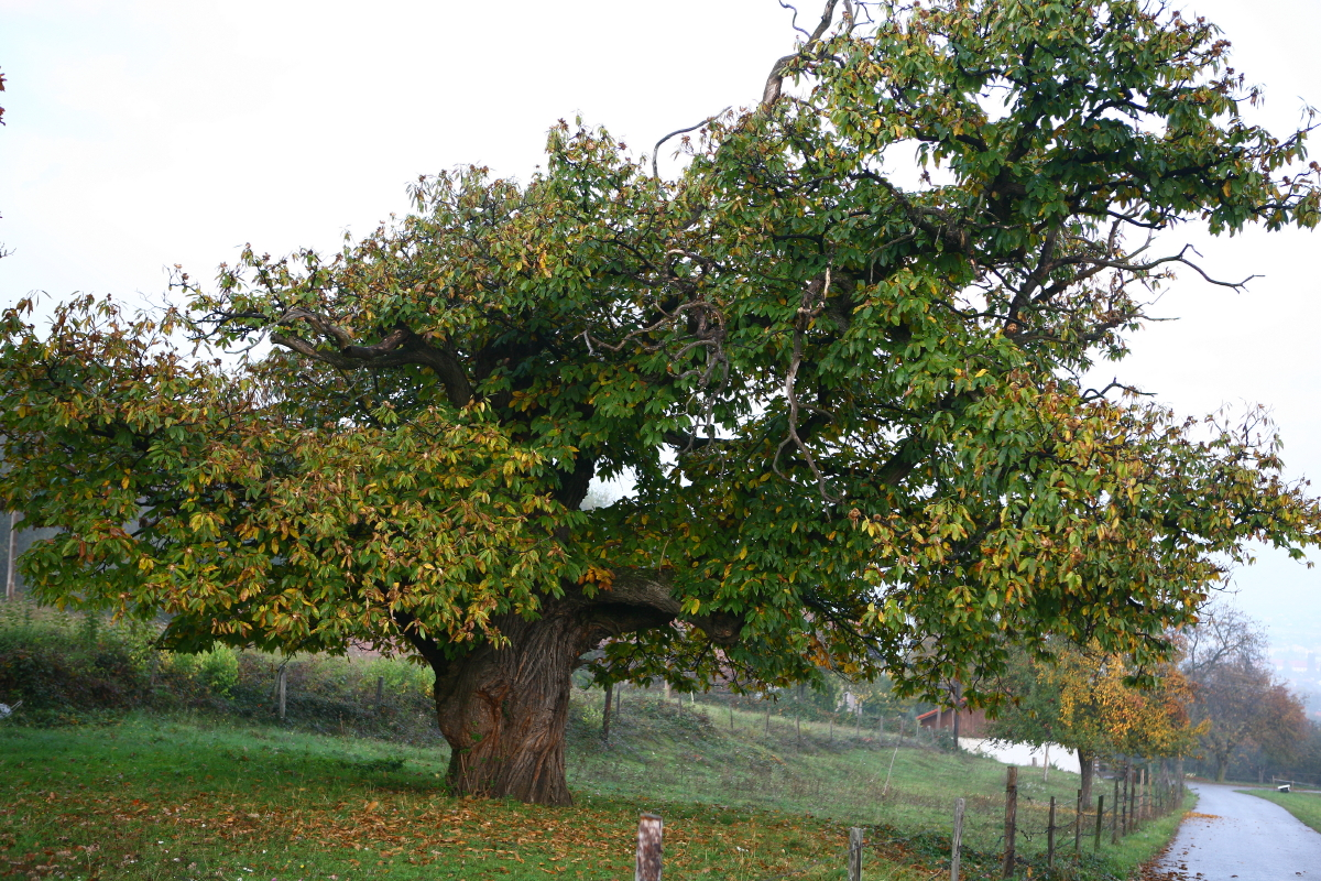 Alter Edelkastanienbaum, Gemeinde Buchbach (Bezirk Neunkirchen, Österreich)